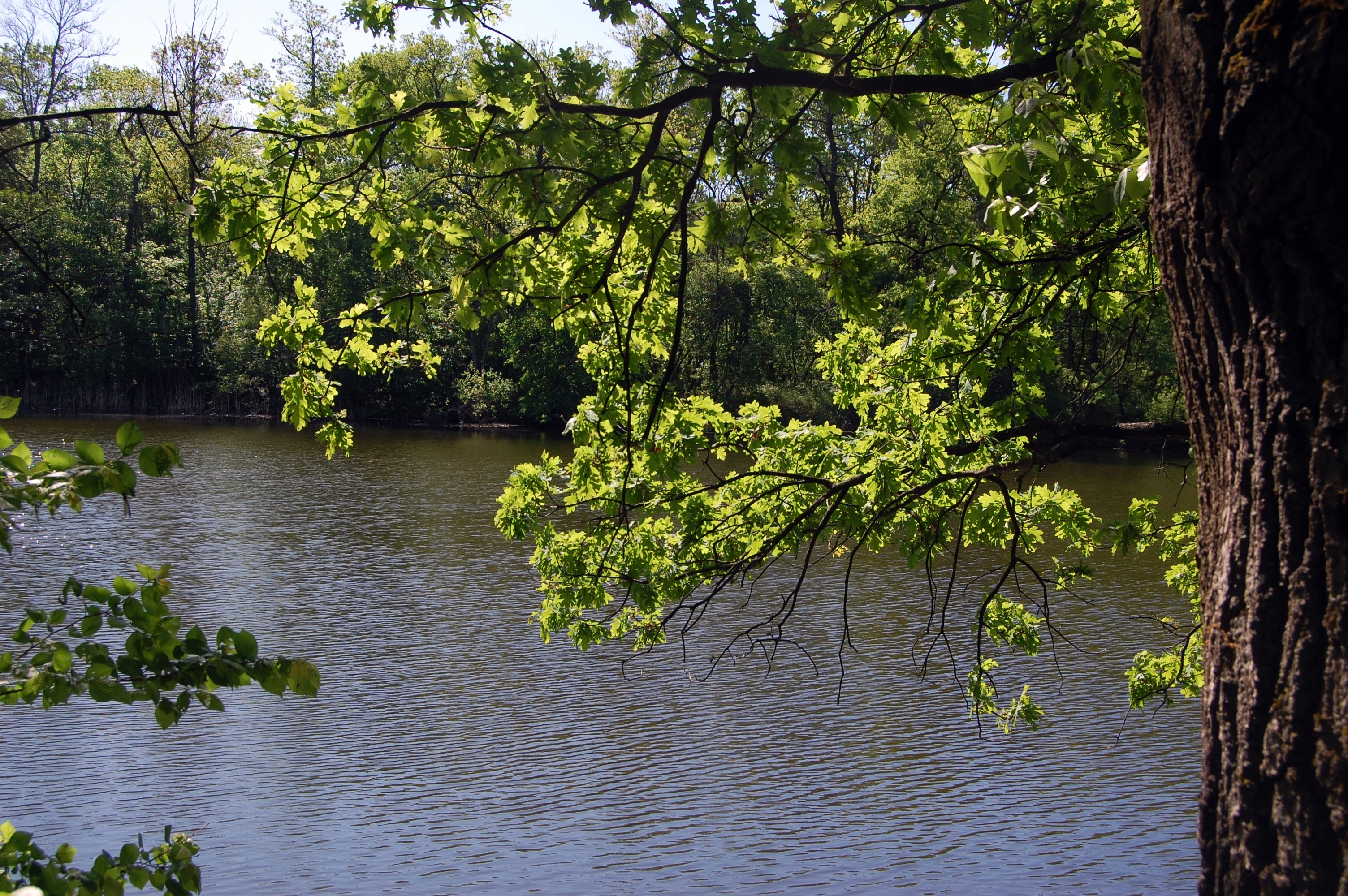 Озеро Черникове. Кремінський р-н, Луганська обл. Україна